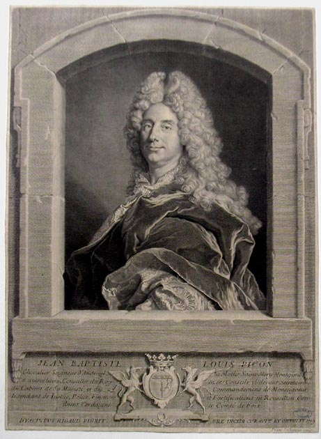 Portrait de Jean-Baptiste Louis Picon (1663-1727), vicomte d'Andrezel